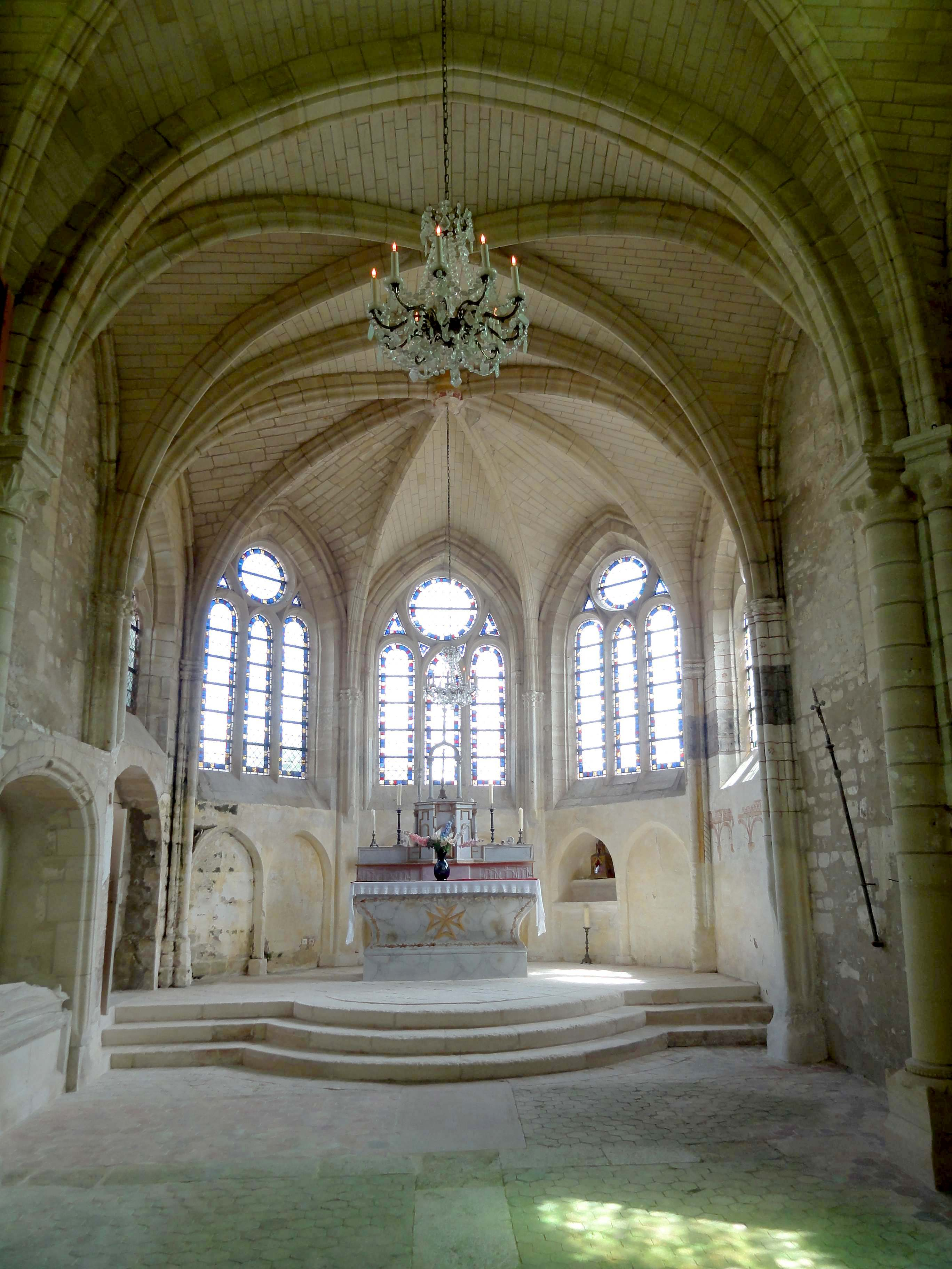 Intérieur de l'église (voir titre).